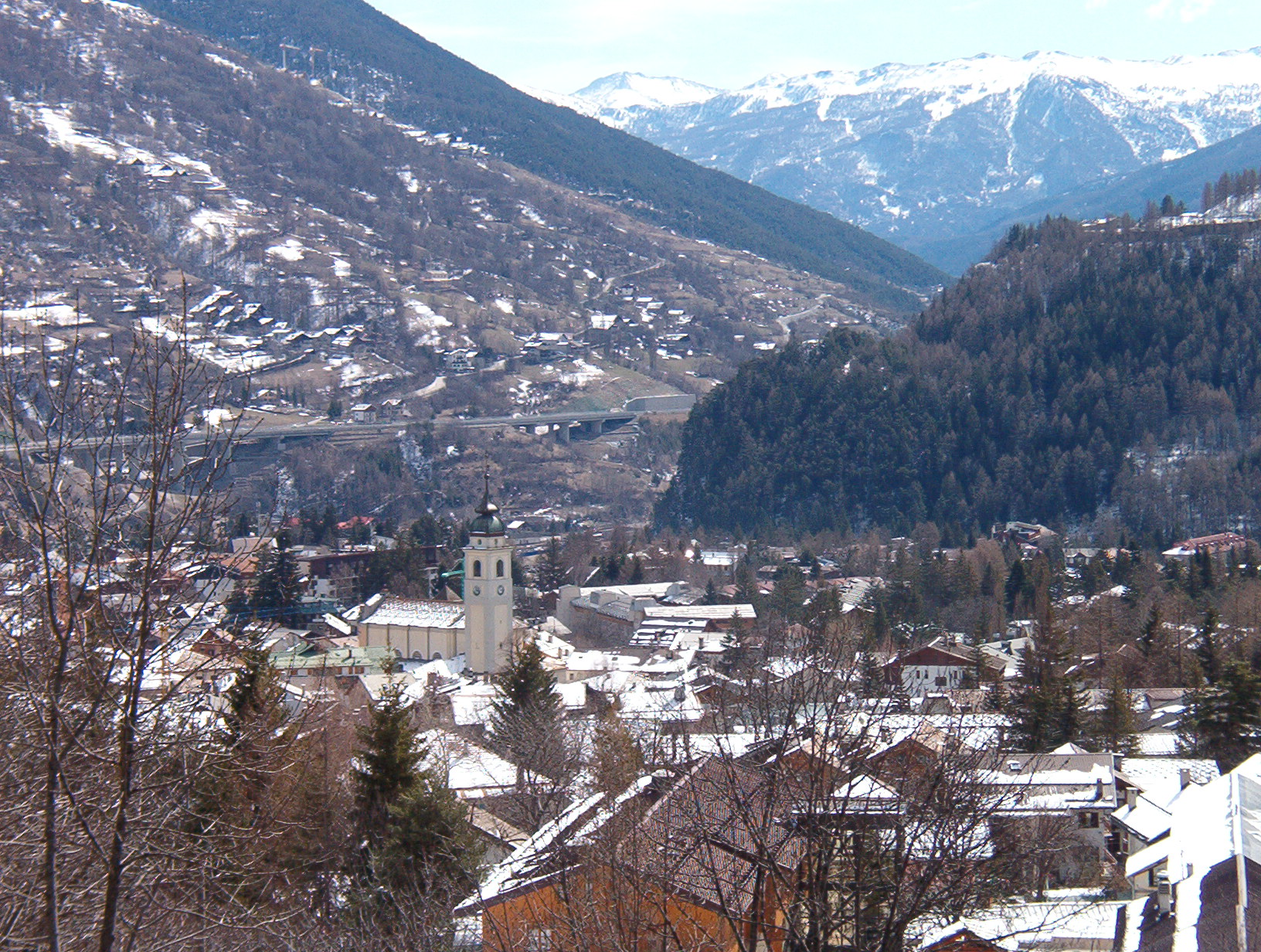 Panorama di Bardonecchia - Val di Susa - Provincia di Torino - Italy